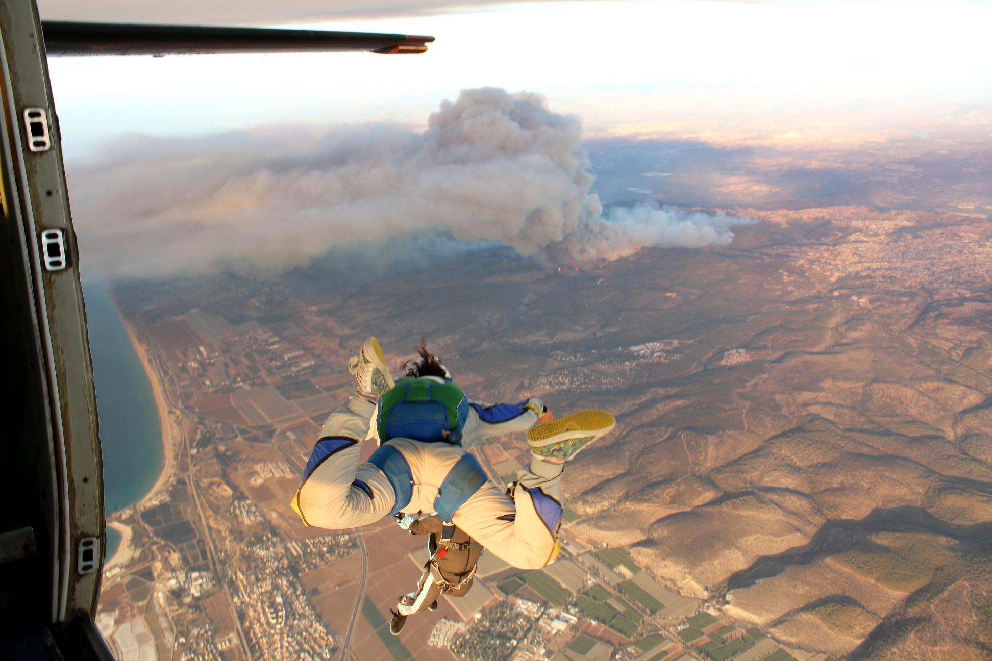 צניחה חופשית מעל חוף דור-הבונים בשעות הצהריים המאוחרות של ה-2 בדצמבר 2010. ברקע נראות להבות ועשן השריפה הגדולה בכרמל שפרצה מספר שעות קודם לכן. במרכז התמונה הישובים ניר עציון, עין הוד ועין חוד, ובצדה השמאלי עתלית ועין כרמל.